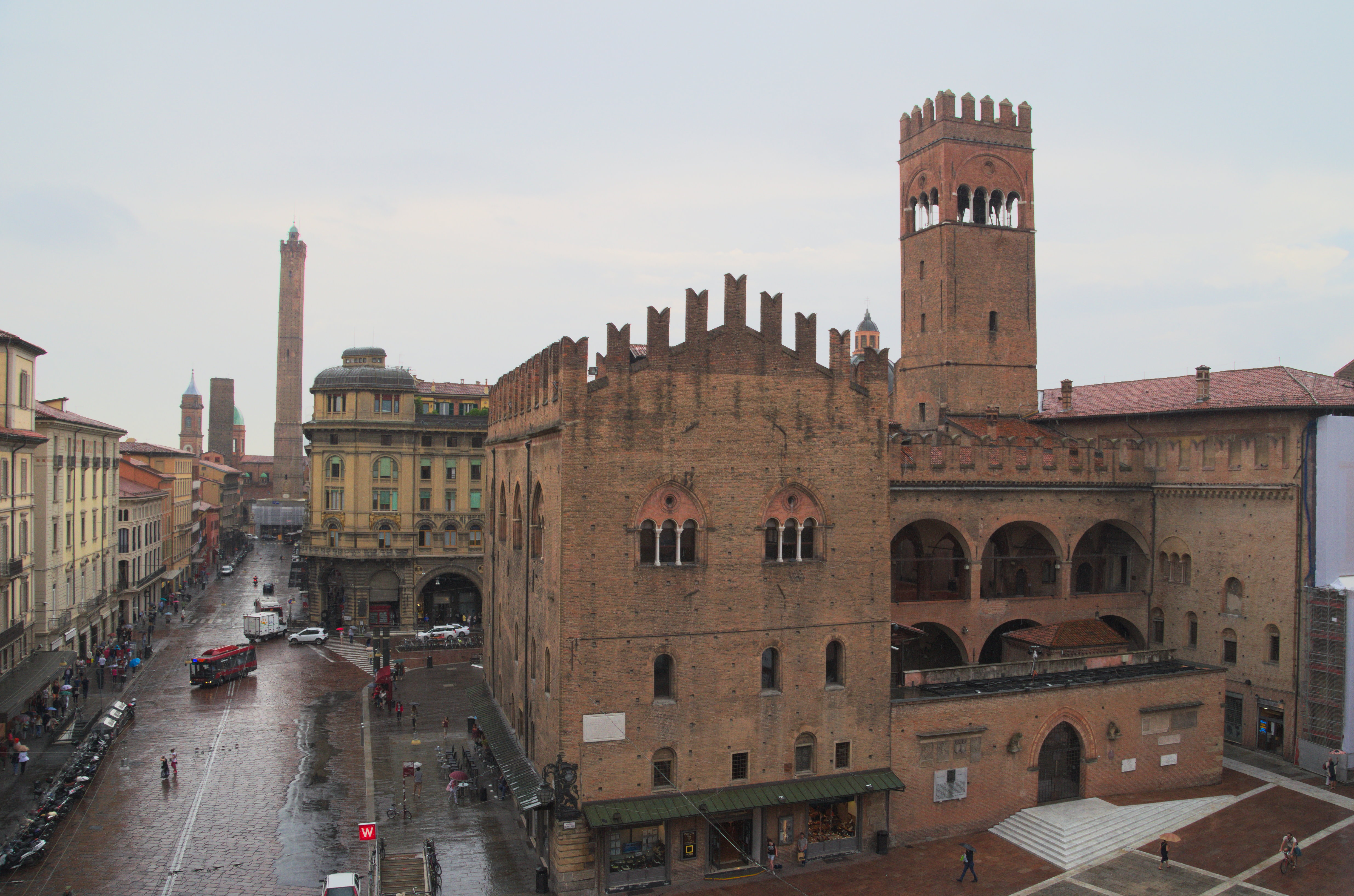 Le Palazzo Re Enzo, un bout de la Piazza del Nettuno, la Via Rizzoli, au bout de laquelle se situe la Torre degli Asinelli, depuis le musée civic, situé dans la mairie.